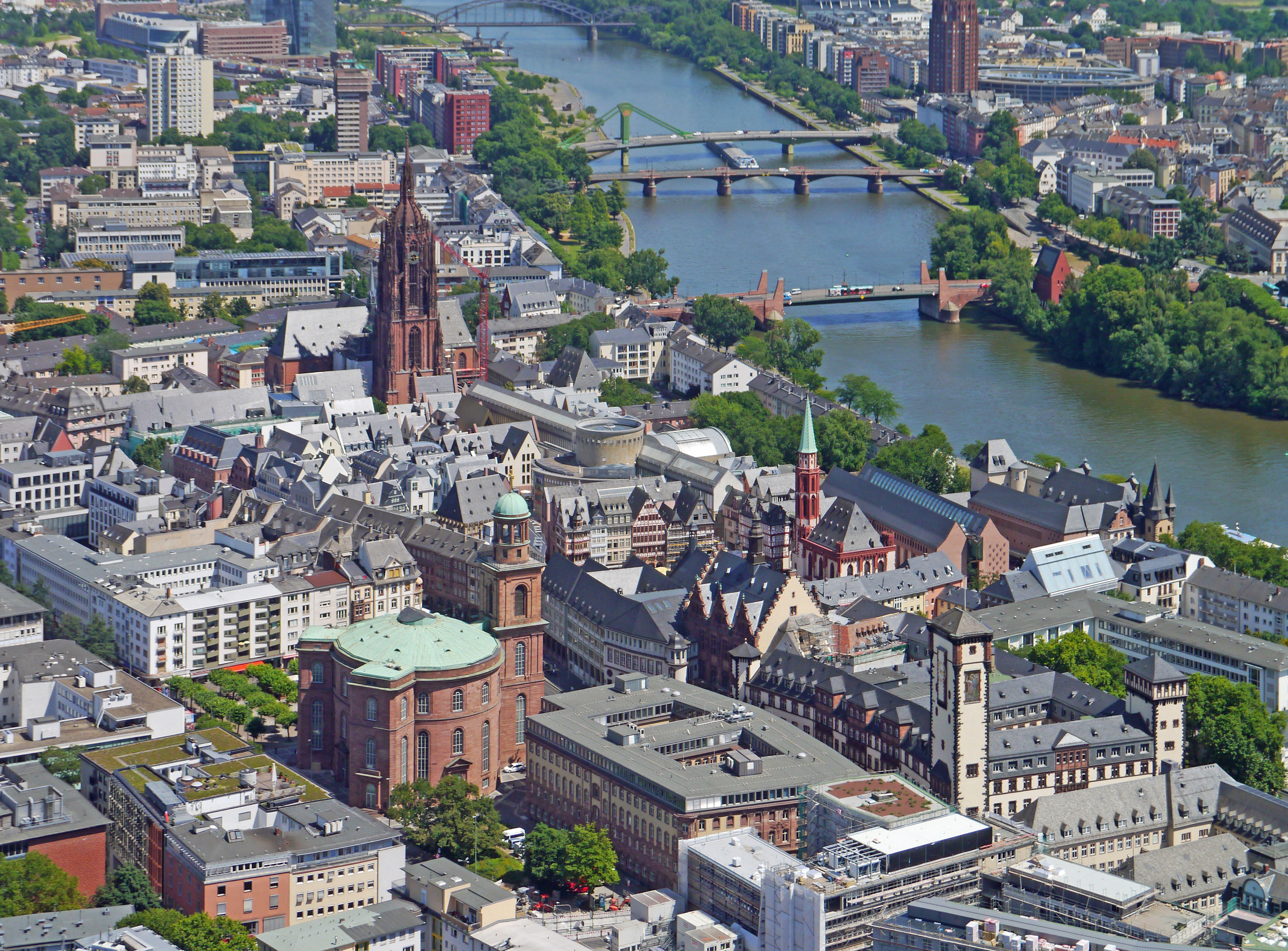 Dom-Römer-Paulskirchen-Areal, 2018 in Frankfurt am Main vom Maintower aus.